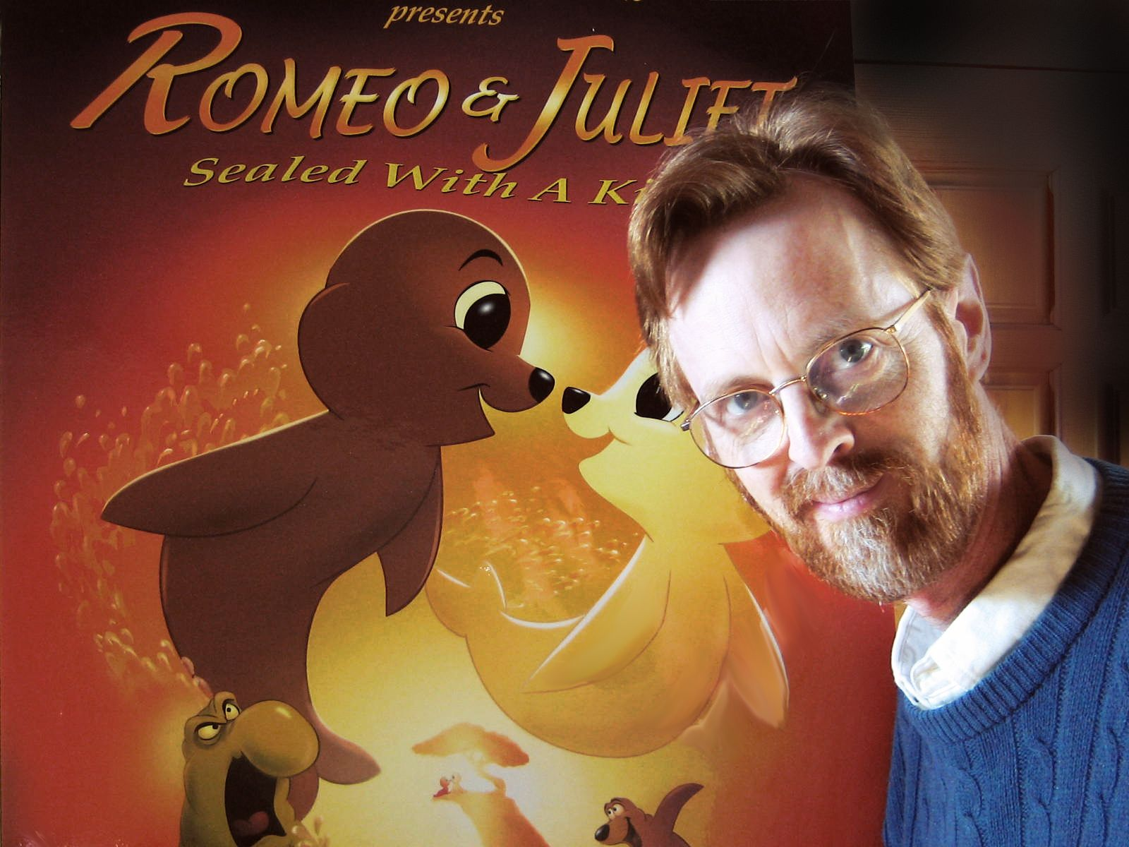 Phil Nibbelink, réalisateur et animateur américain, posant devant l'affiche de son film Romeo & Juliet: Sealed with a Kiss (2005)